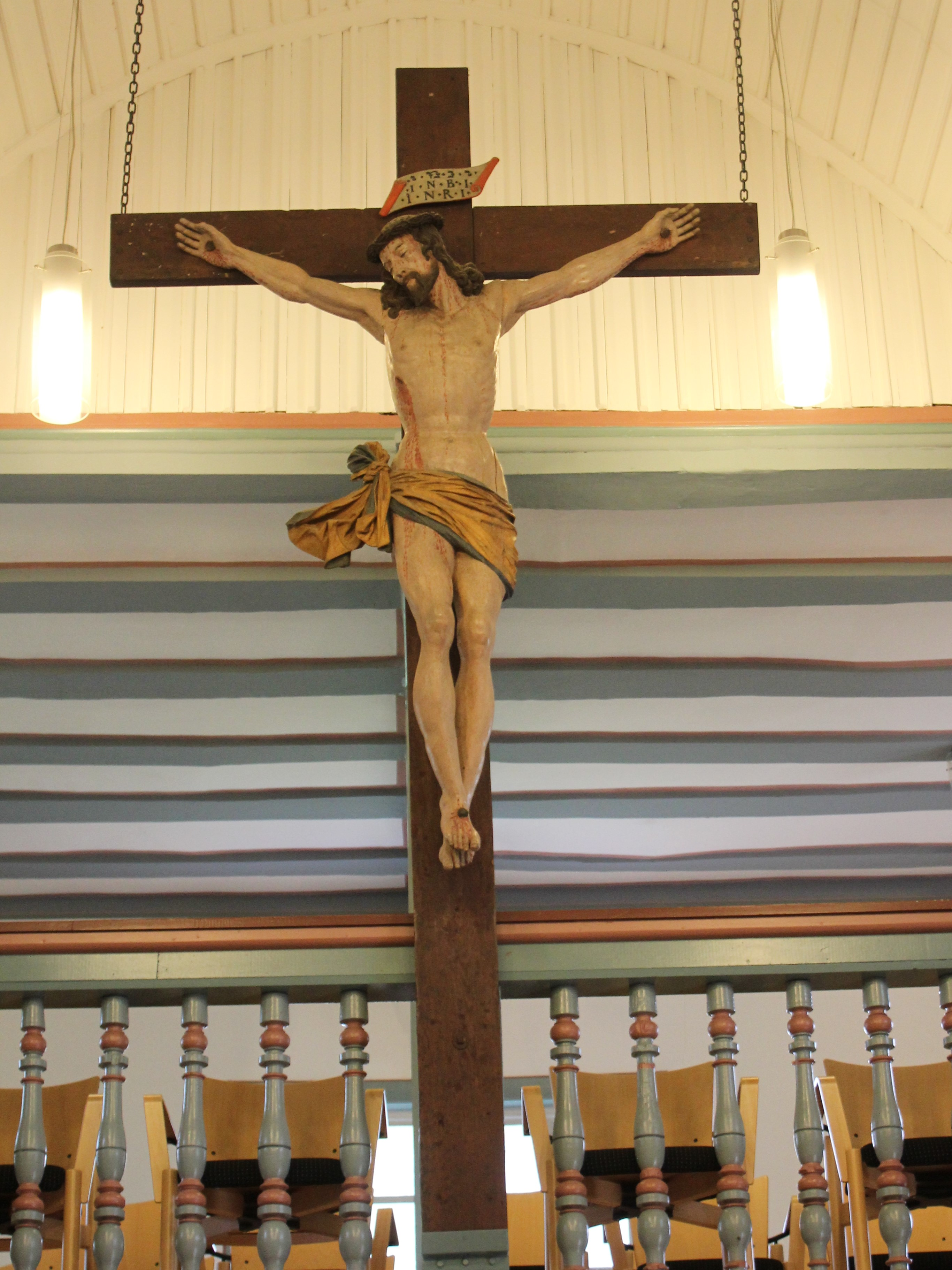 Kapelle Alter Friedhof, Gießen, Hessen, Deutschland